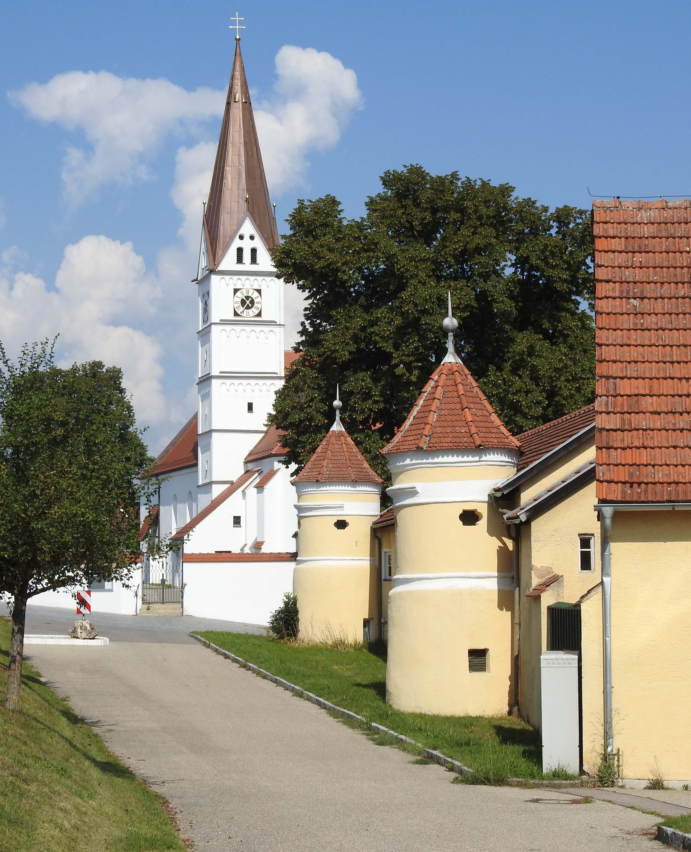 Schlossmauer und Pfarrkirche in Straß, Burgheim